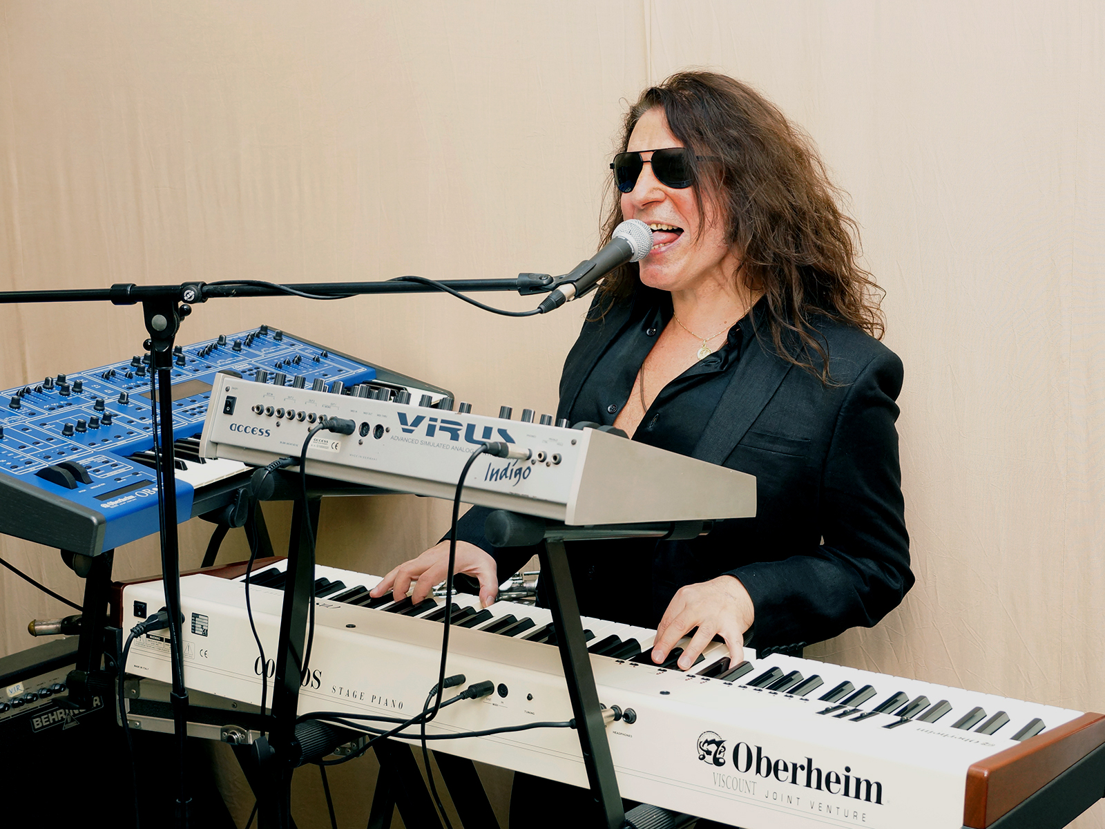 2017 год. Работа над новым альбомом.